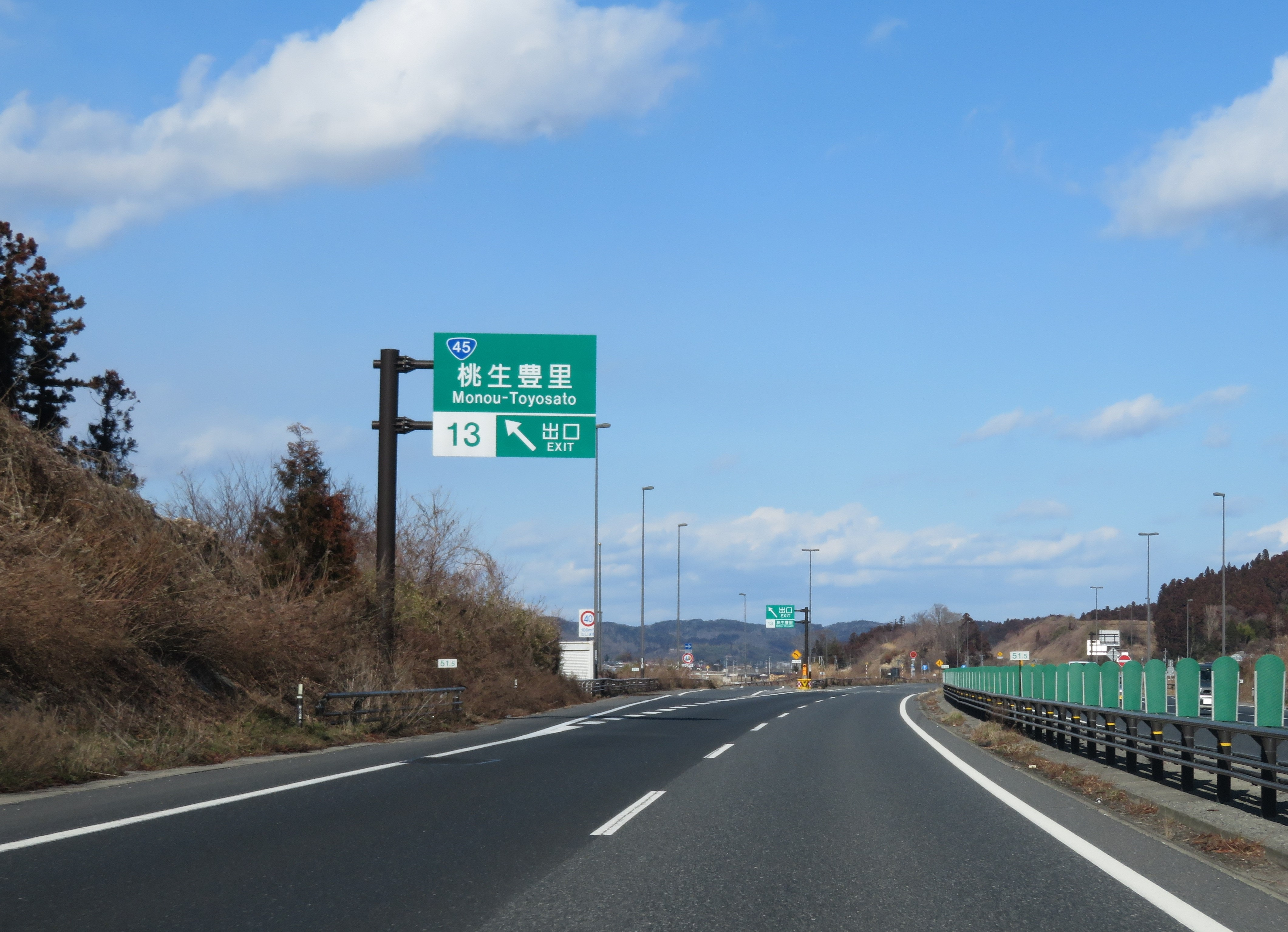 三陸自動車道桃生津山ＩＣ下り出口付近 Canon PowerShot SX720 HS